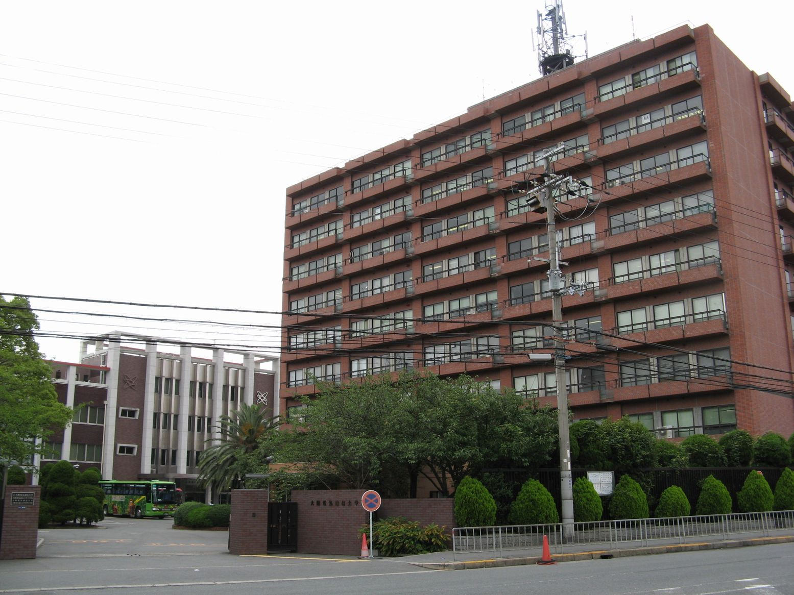 大阪電気通信大学 - 2007年7月2日 Bakkai撮影